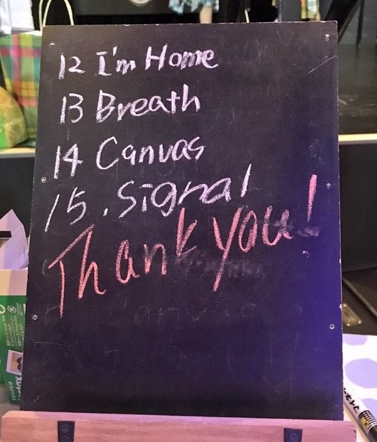 amiinaセトリボード(20160213(1-2))